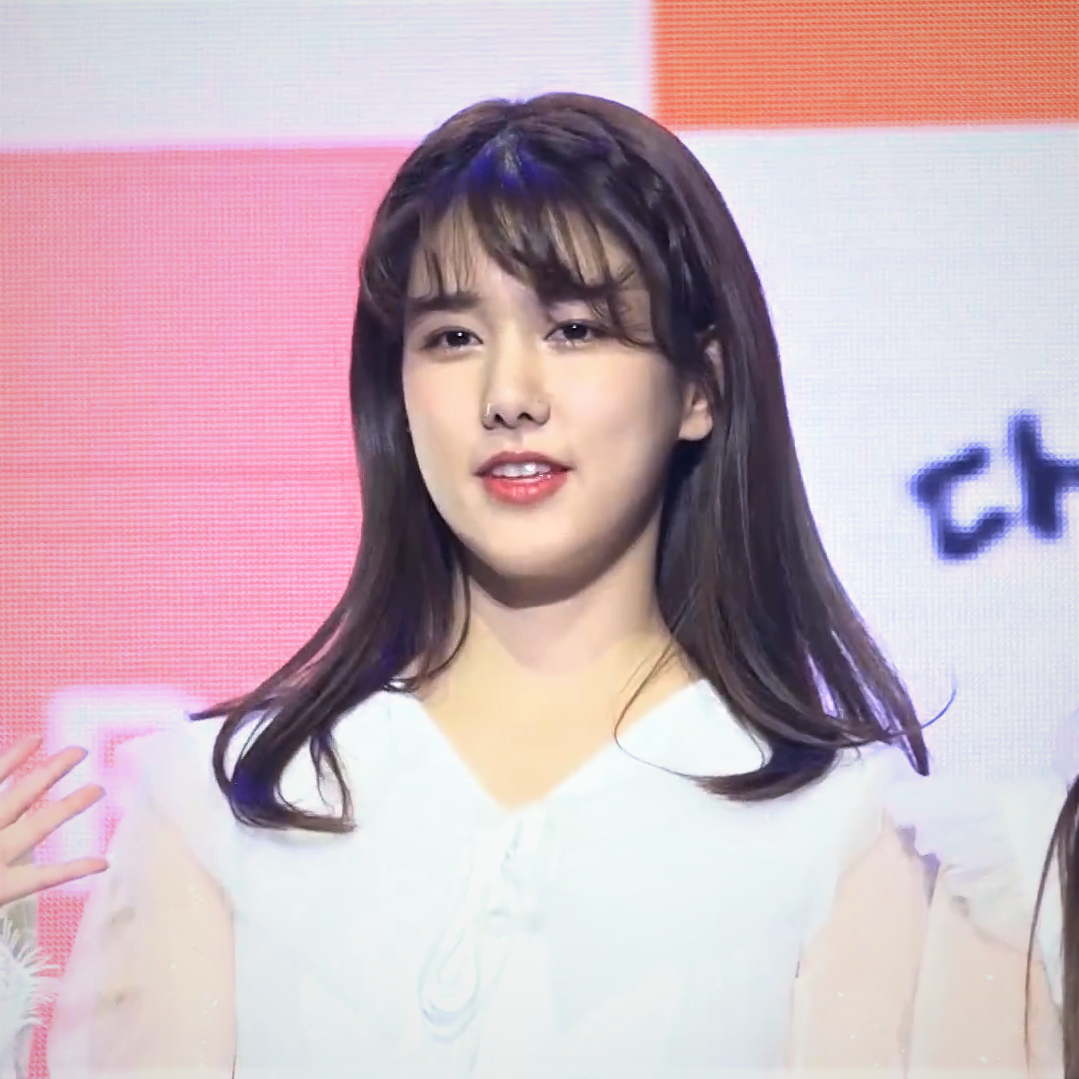 180303 유니티 팬미팅